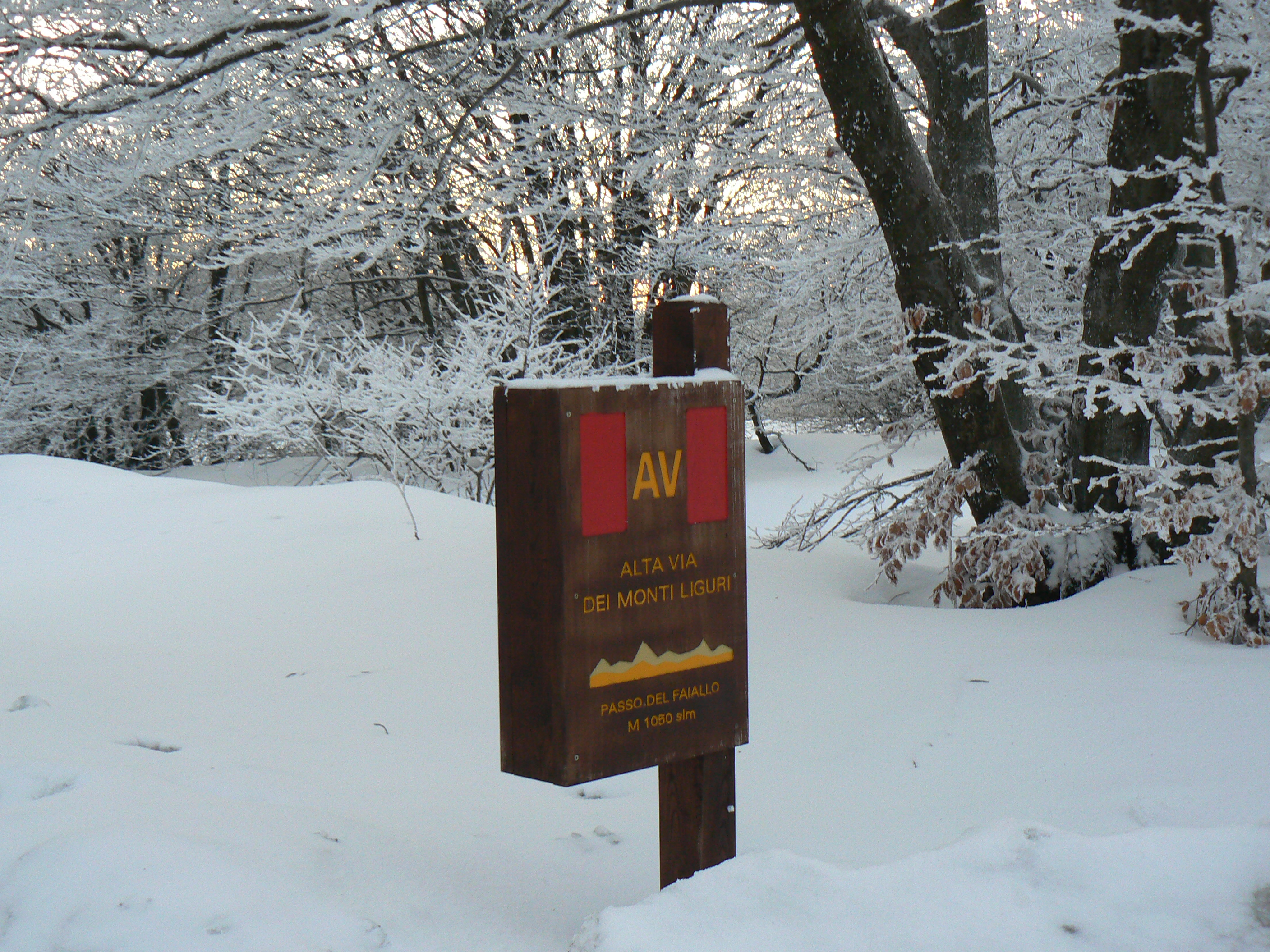 Pannello AVML. Posto tappa sul passo del Faiallo